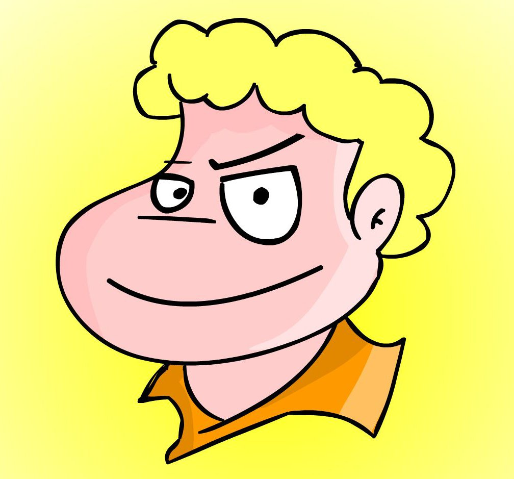 El Dino da Sandrà